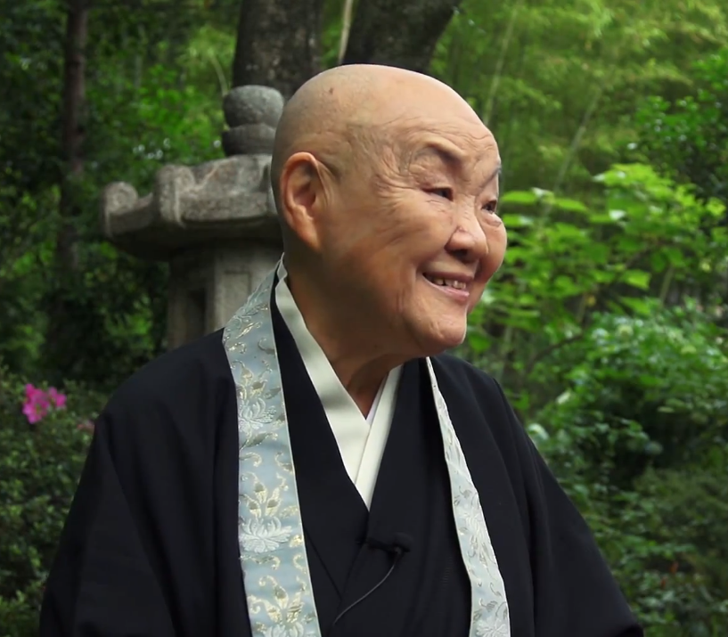 瀬戸内寂聴。2012年6月30日、京都の寂庵。 See also: Conference - Ageing-related diseases: From Treatment to Prevention.